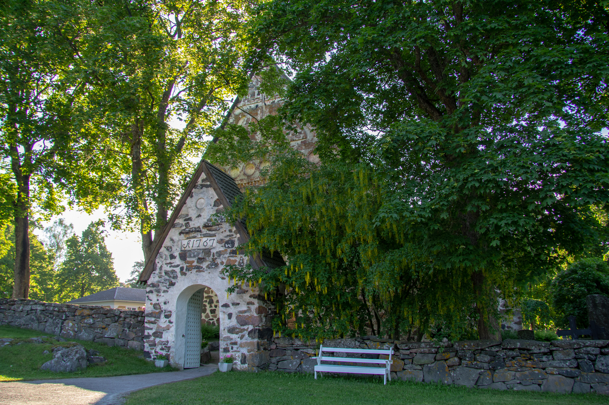 Nagu kyrka är en medeltida gråstenskyrka från 1440-talet belägen i Nagu.